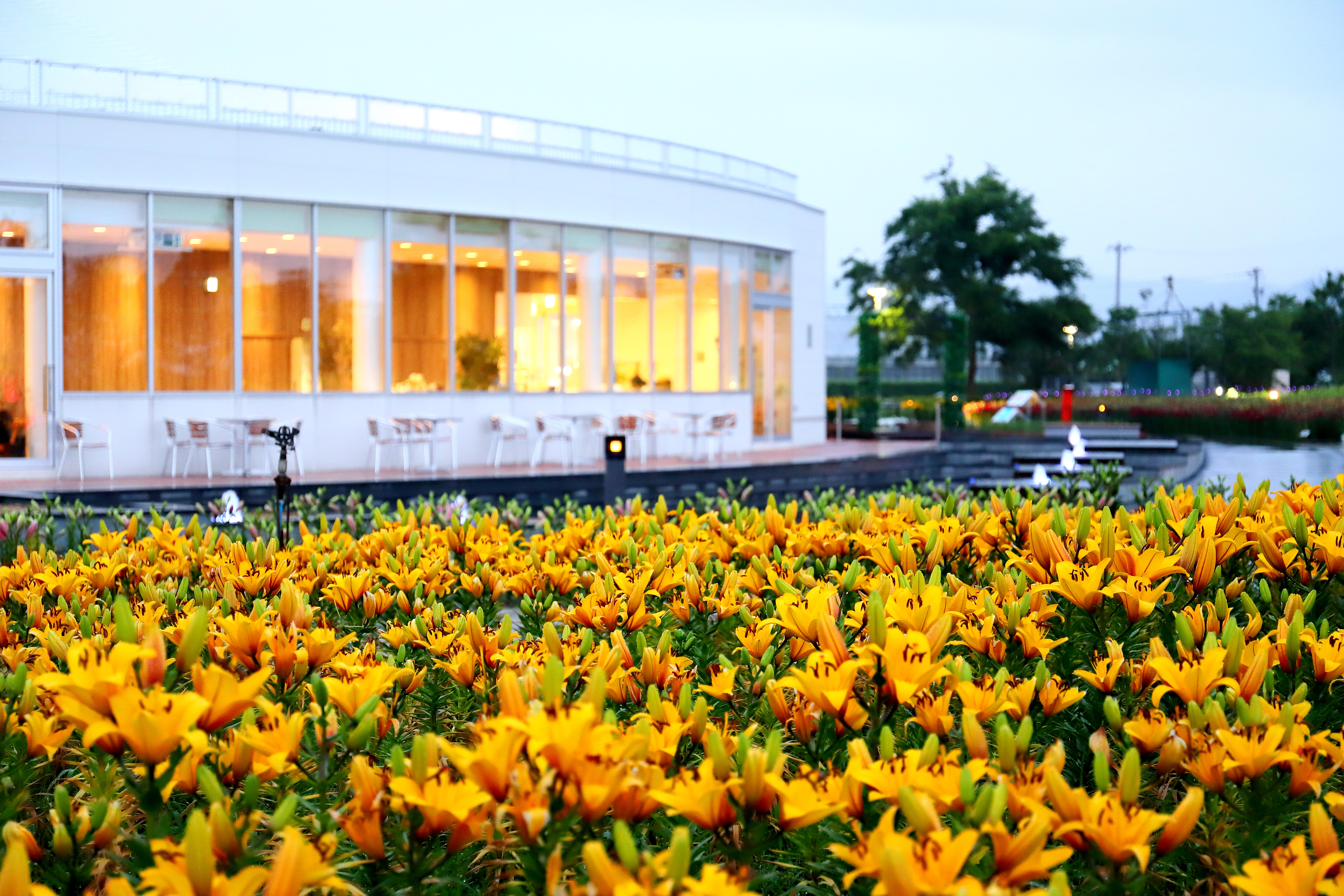 ゆりの里公園